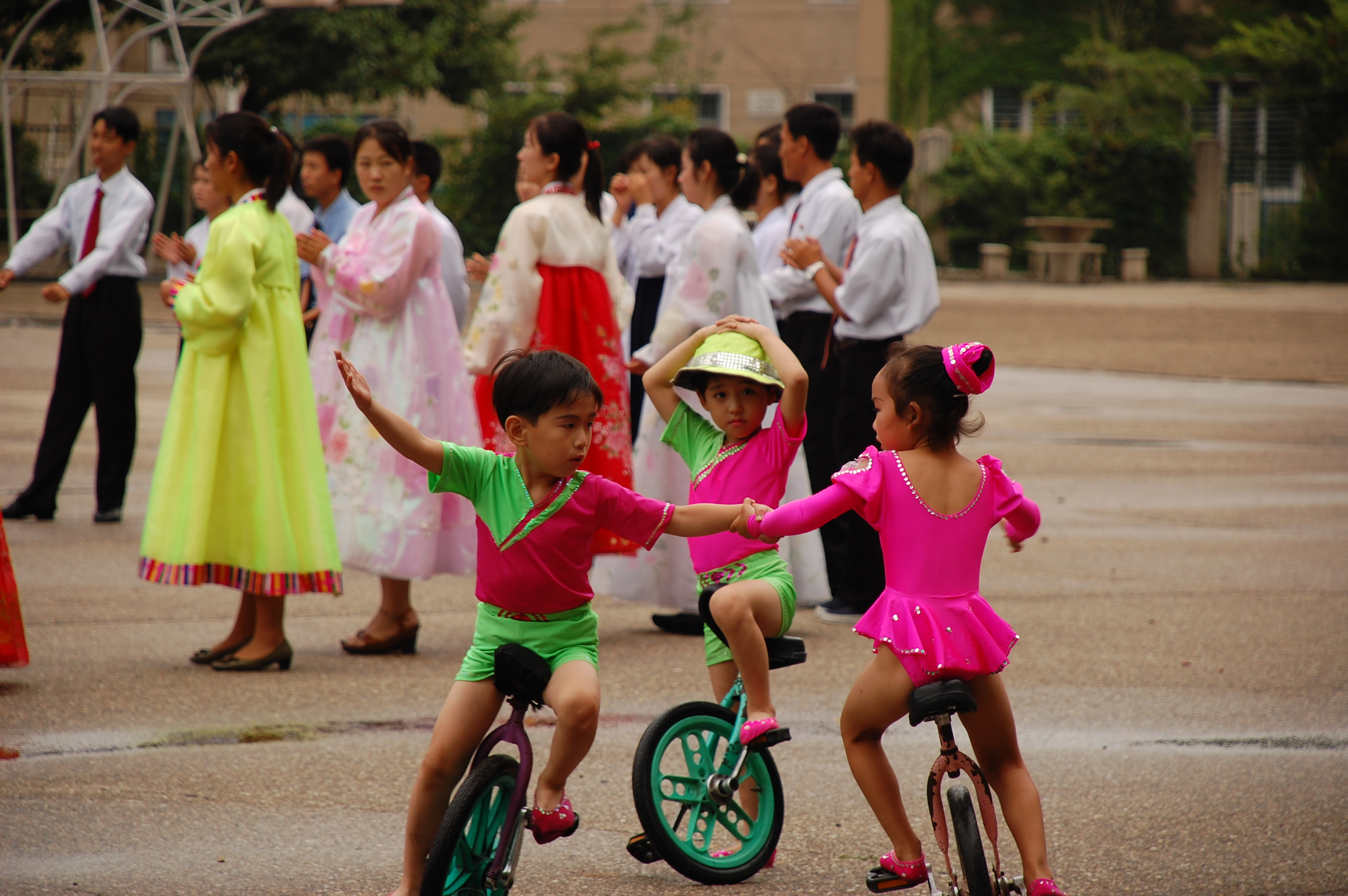 North Korea — Pyongyang